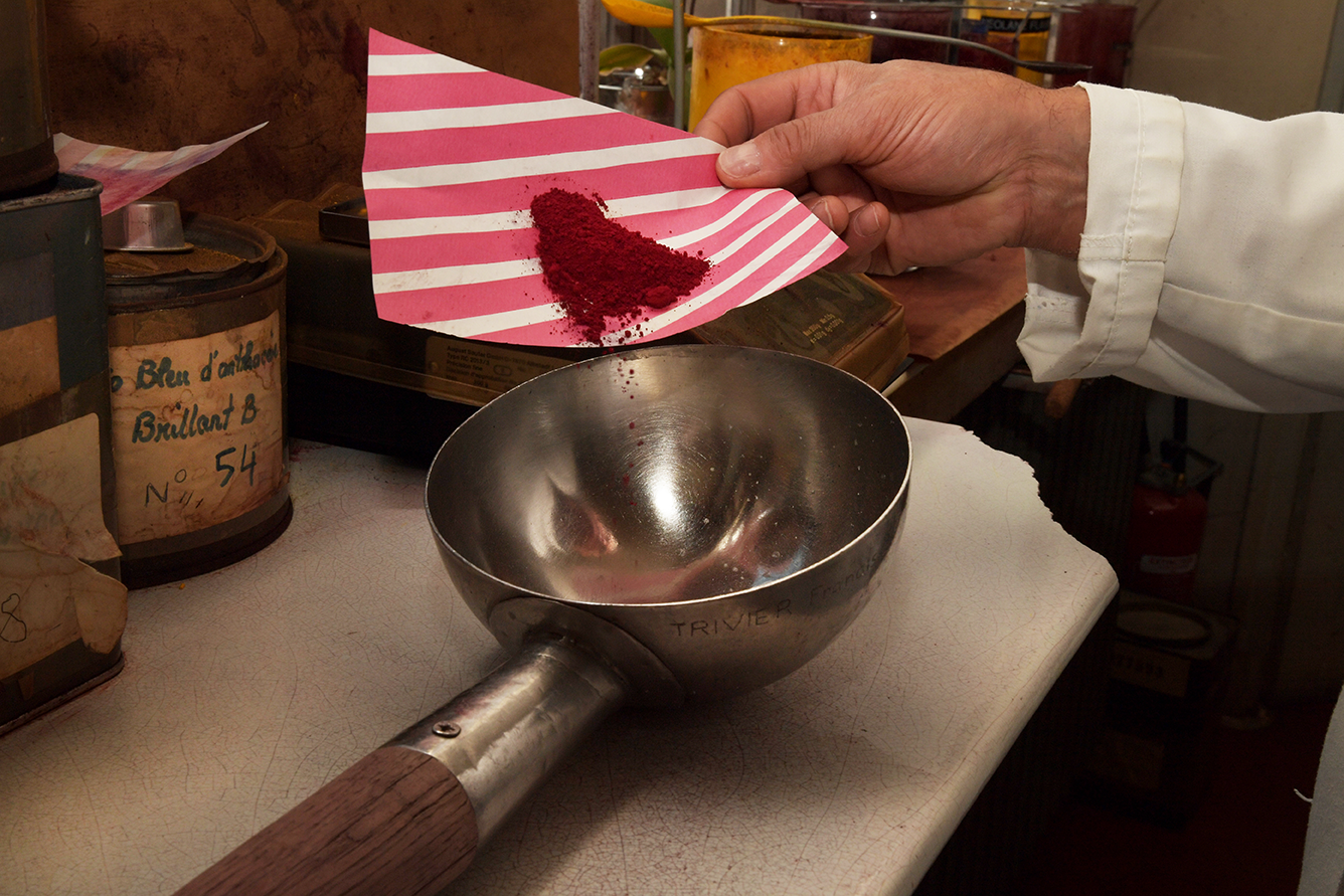 Fabrication teinture, atelier de teinture, Mobilier national